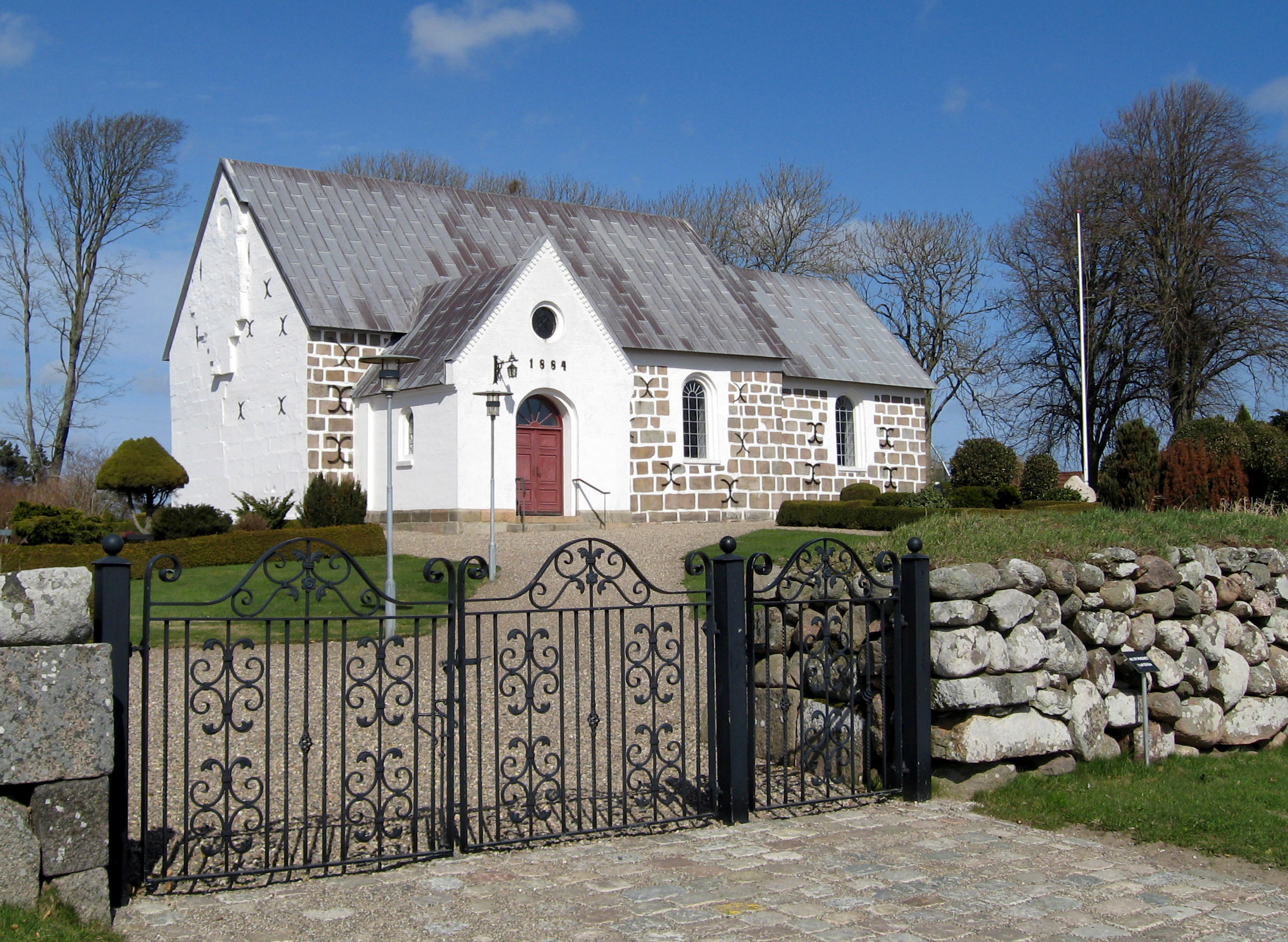 Skærum Kirke, Frederikshavn Kommune